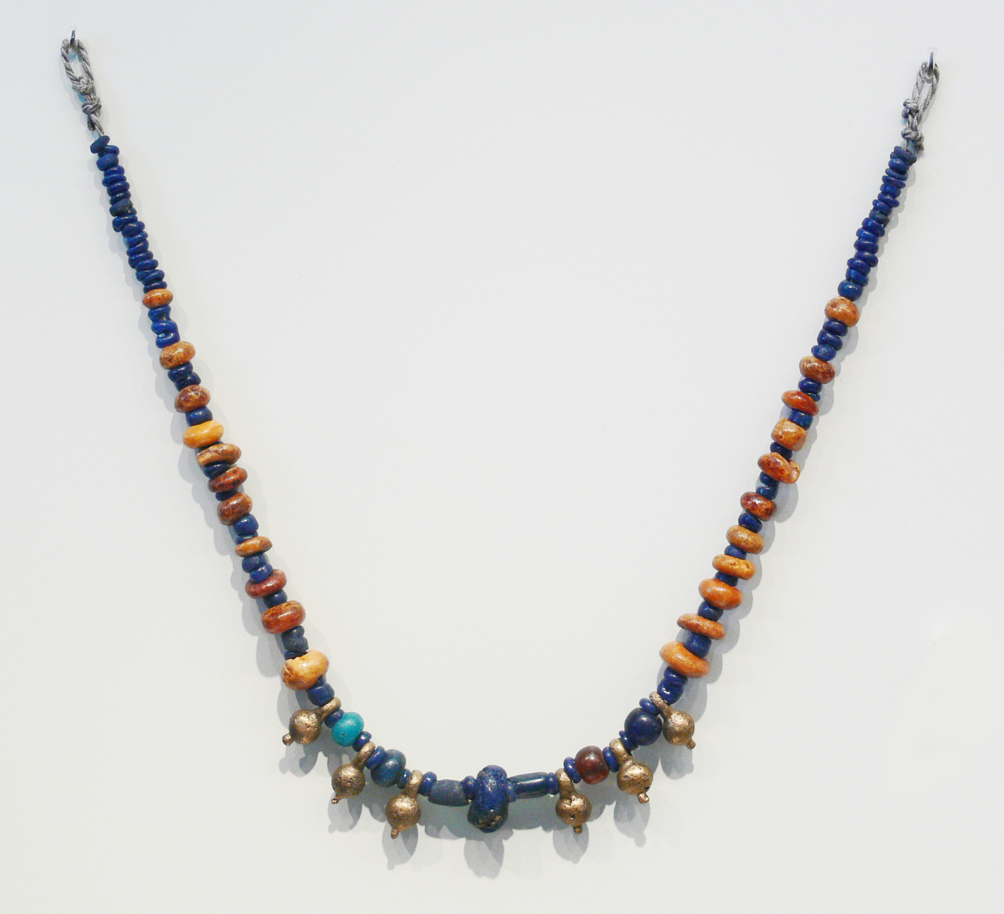 Halsschmuck aus Glas, Bernstein, Lignit und Bronze; 5.–1. Jh. v. Chr., Fundort: Molinazzo d'Arbedo, Tessin (Schweiz). Museum für Vor- und Frühgeschichte Berlin